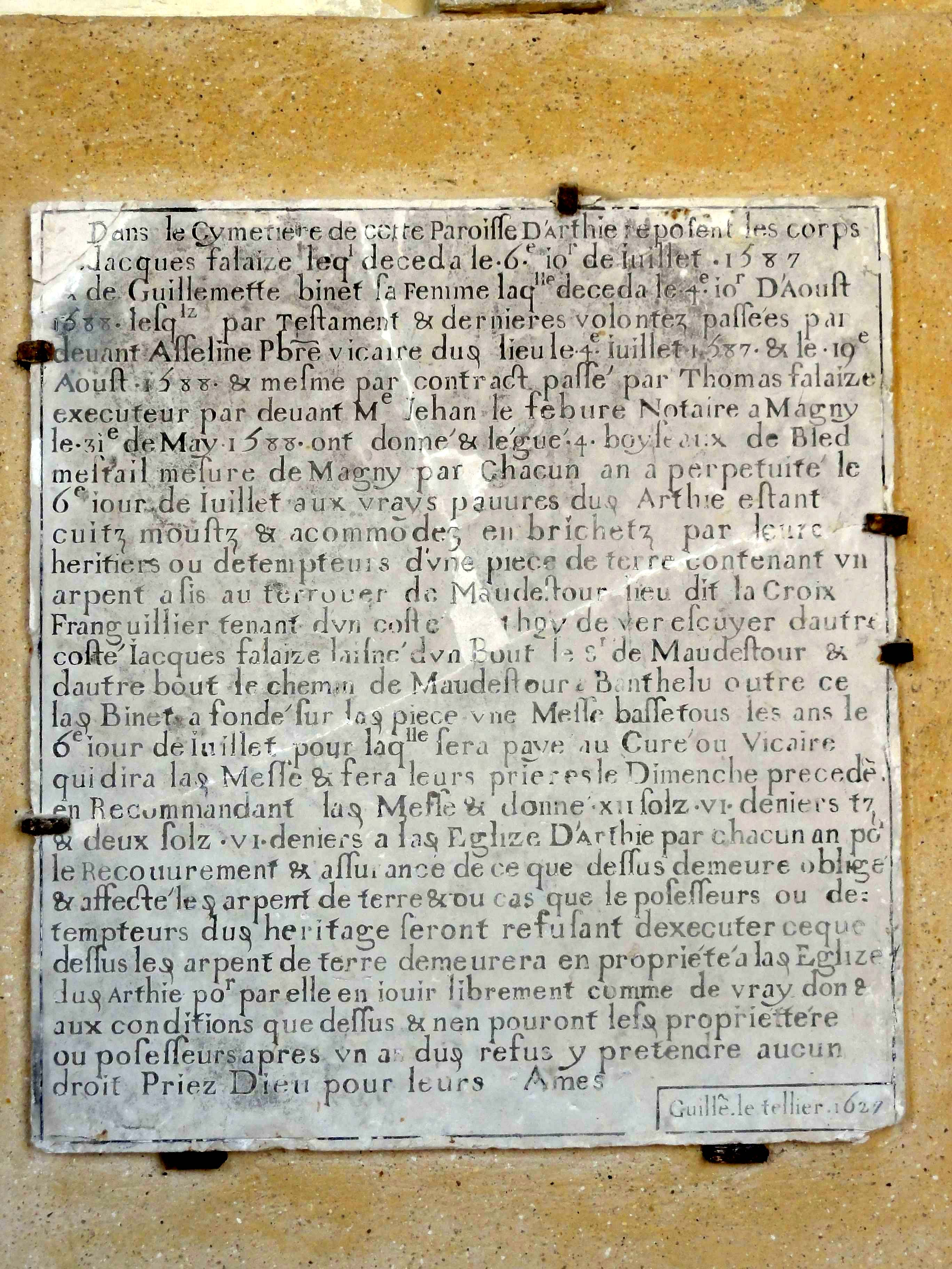 Mobilier de l'église (voir titre).